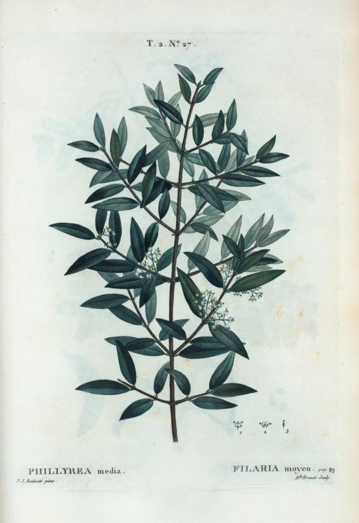 Phyllyrea media = Filaria moyen.